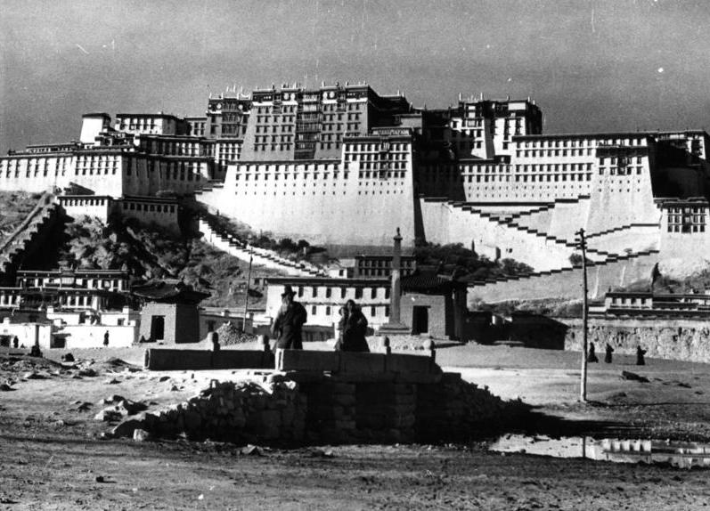 Lhasa, Potala